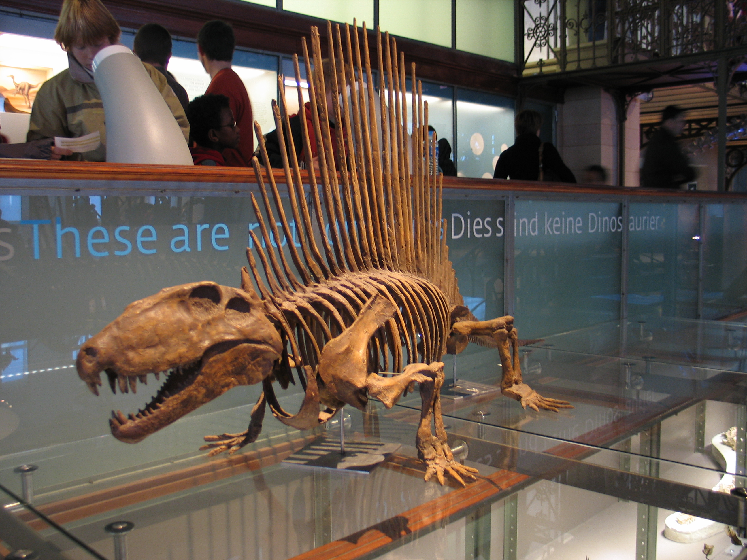 Dimetrodon at the Museum voor Natuurwetenschappen in Brussels, Belgium